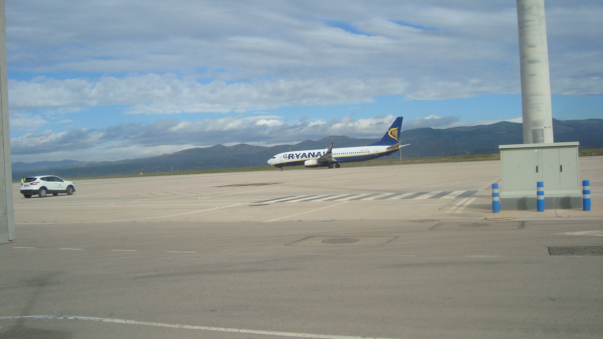 Aeropuerto de Castellón-Costa Azahar, avión de la ruta Bristol